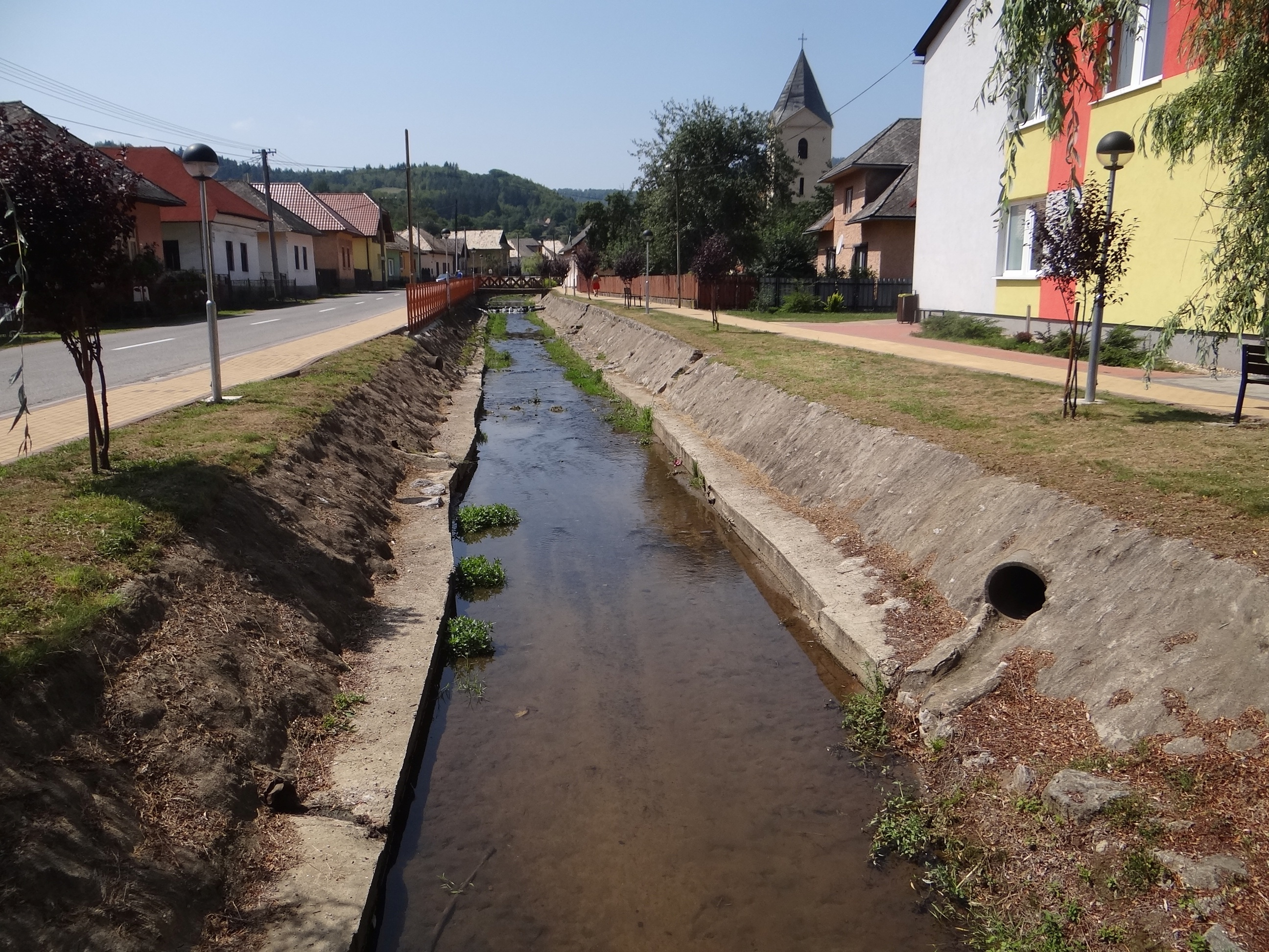 Nižná Slaná